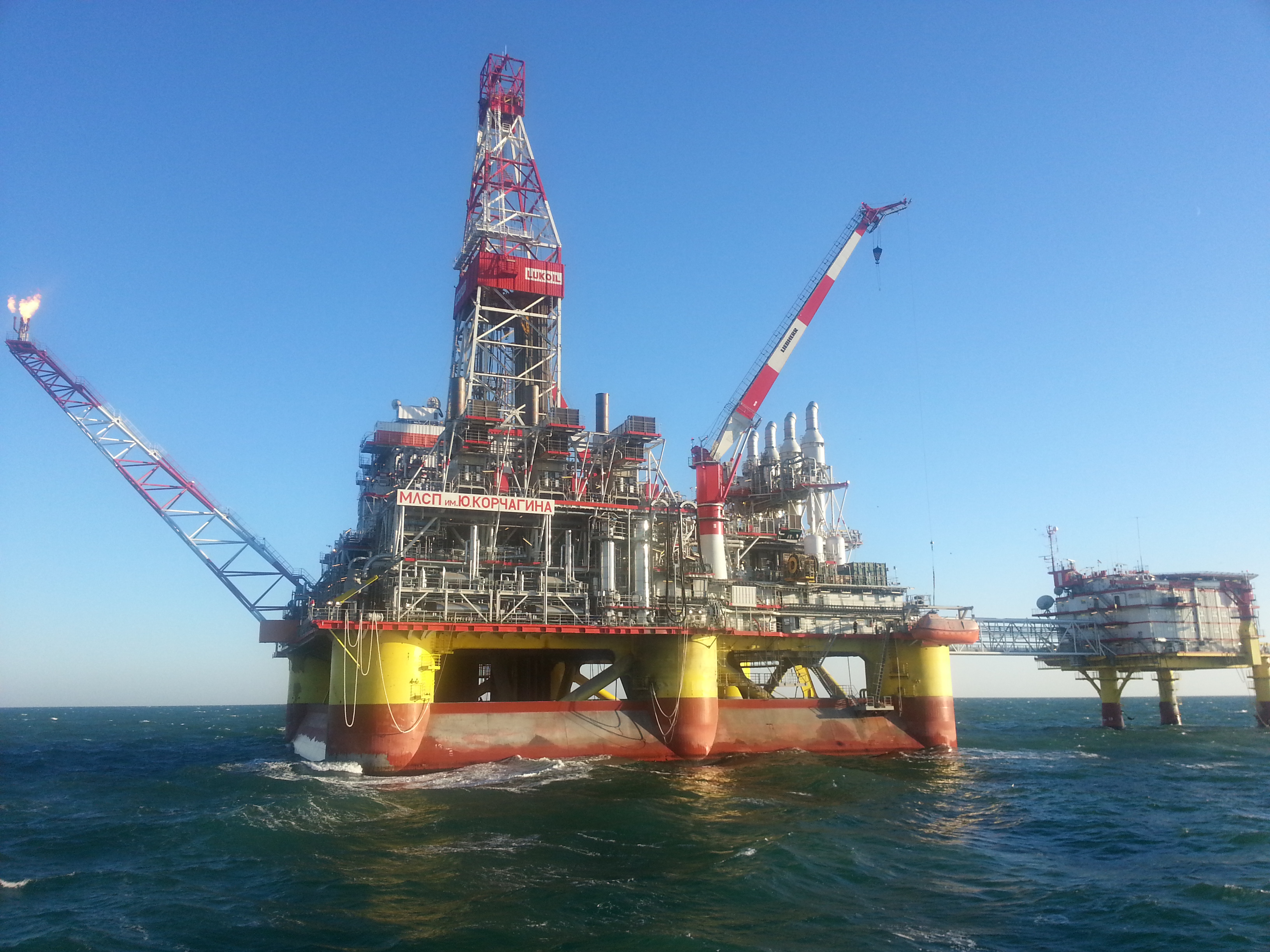 Павел Гуренчук 12